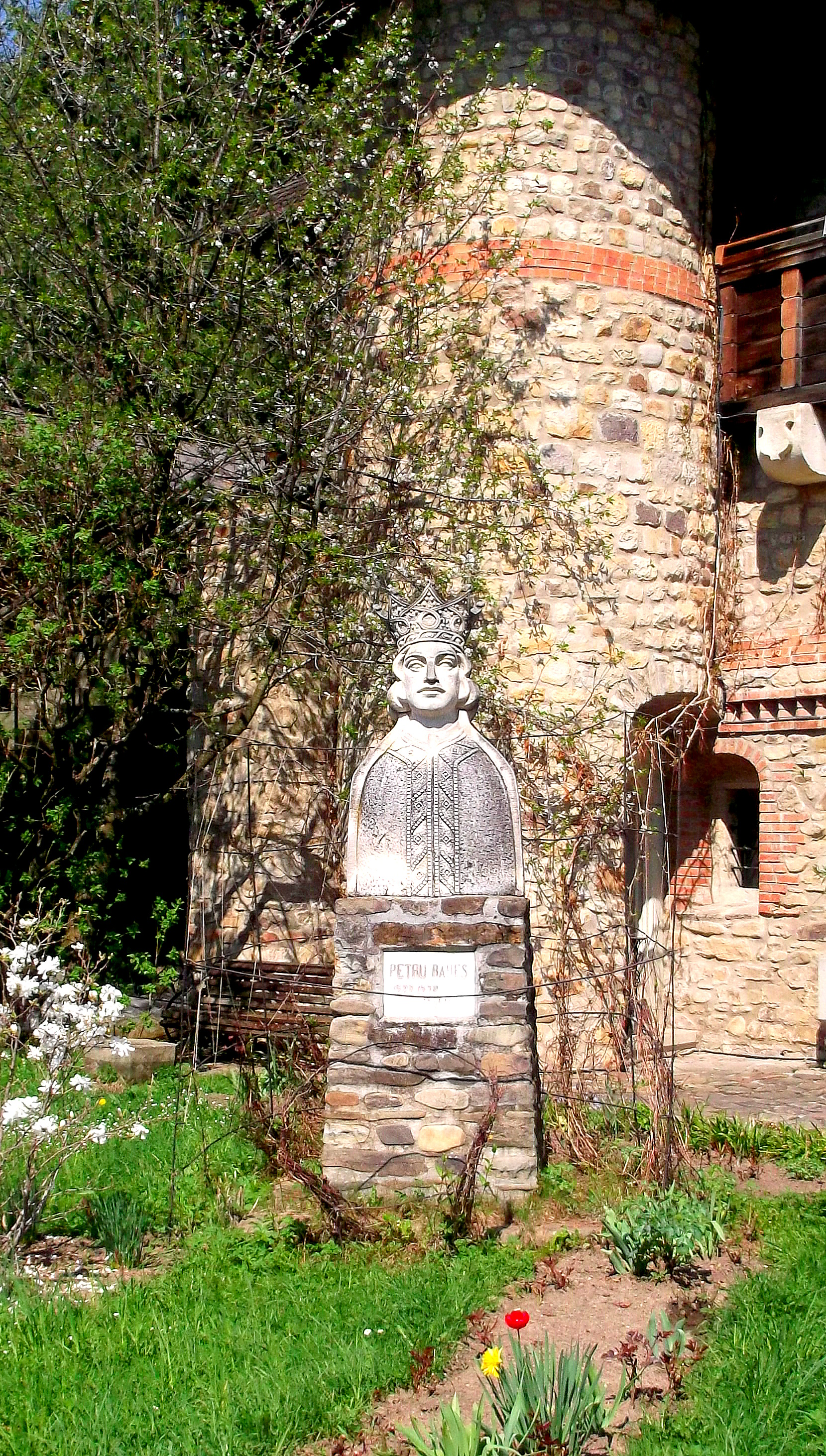 Monastyr Moldovița, popiersie hospodara mołdawskiego Piotra Raresza (Petru Rareș)